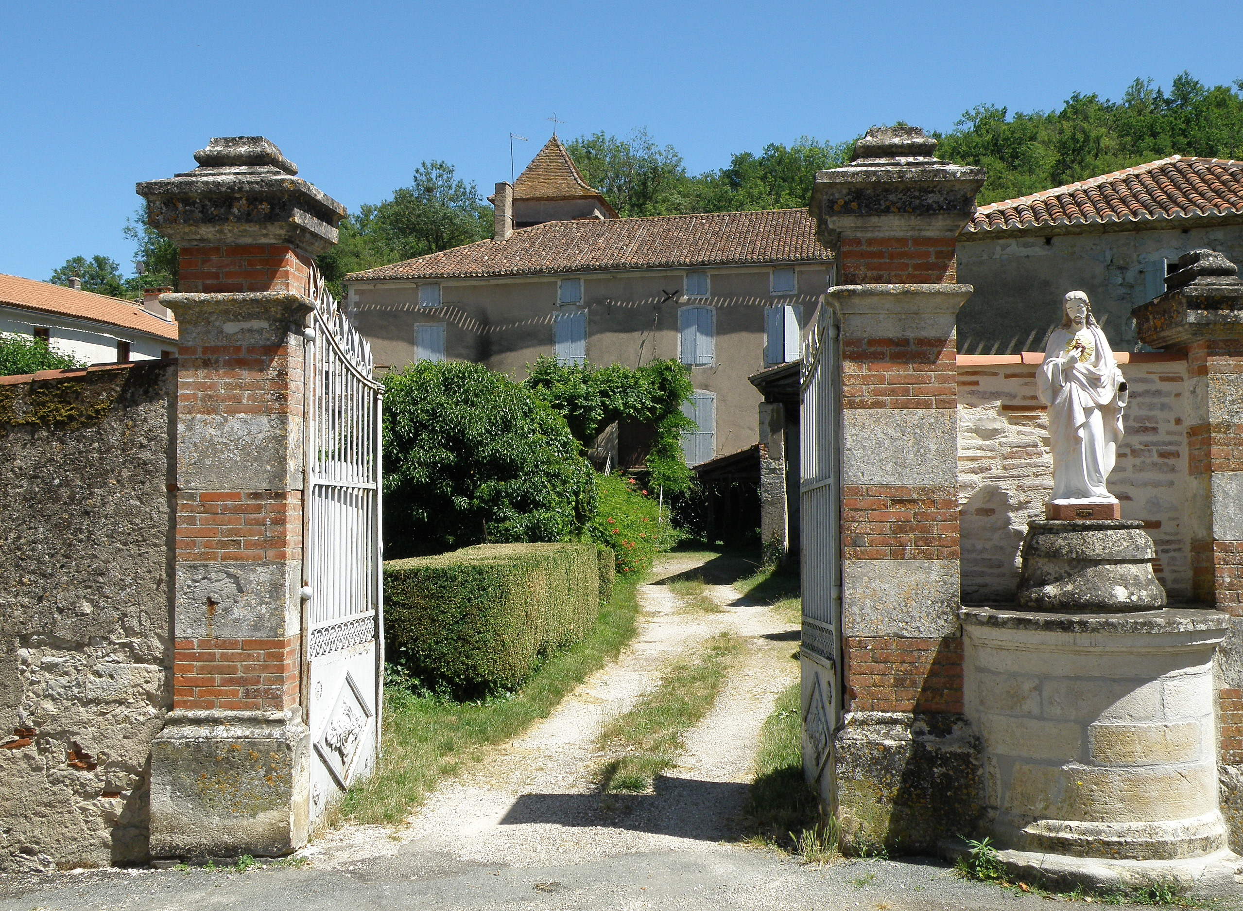 Douelle, commune et village situés sur la rive gauche du Lot, sept km environ (à vol d’oiseau) à l’ouest de Cahors, dans le département du Lot, France (région Midi-Pyrénées). Aspect du bourg, non loin de l'église.